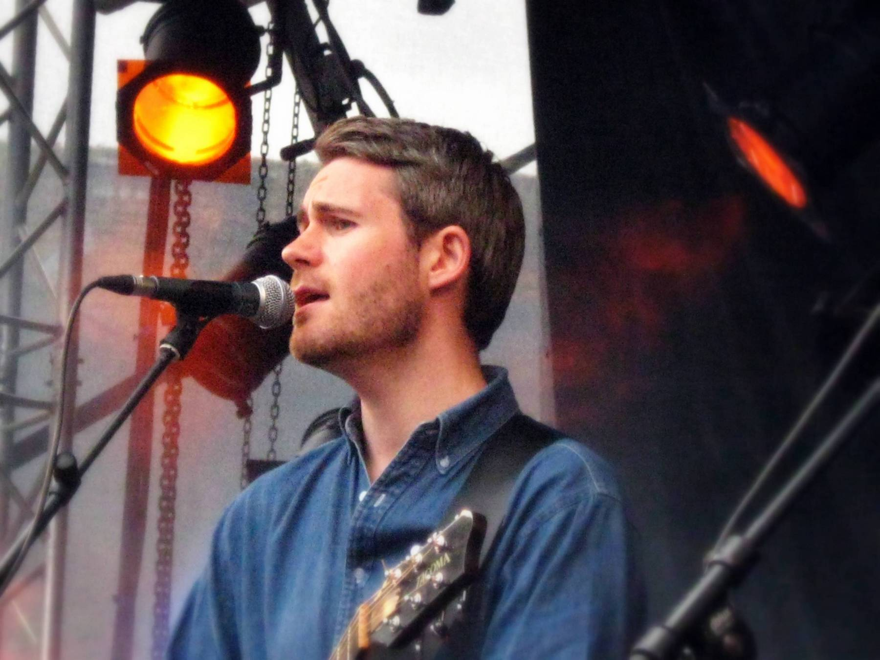 Thomas Holm